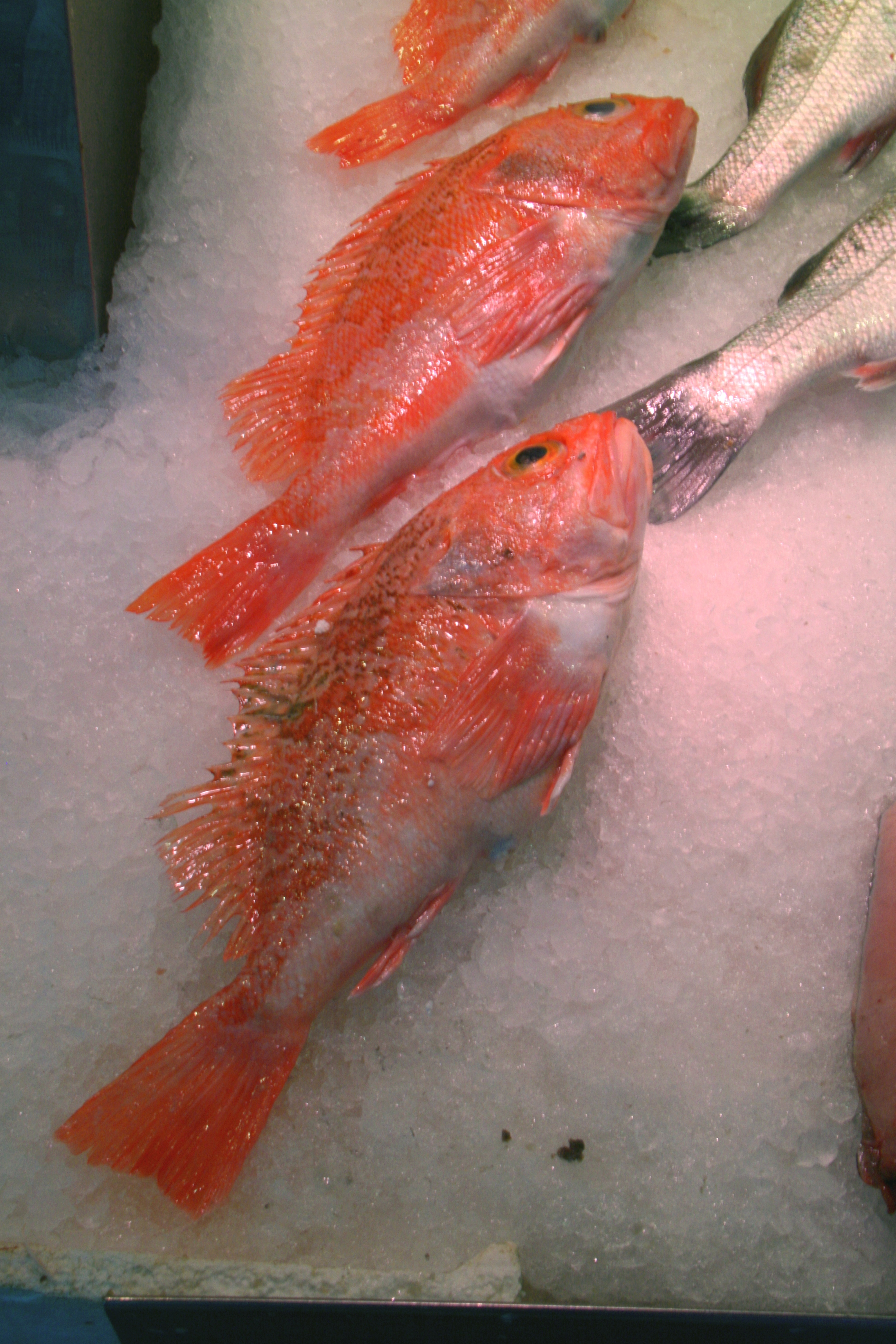 Cabracho -Mercado de Madrid